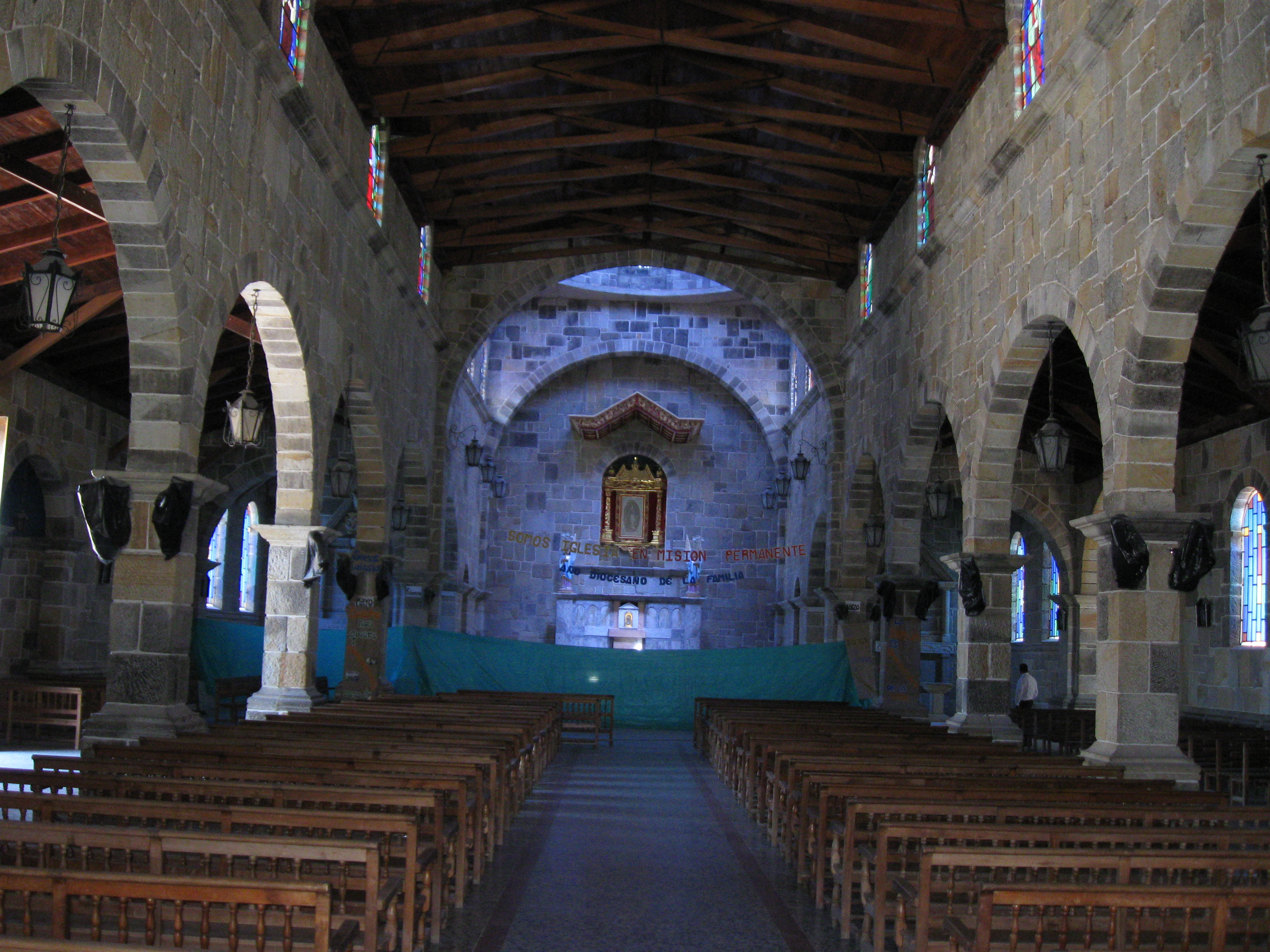 Interior Iglesia Principal, Guadalupe, Santander